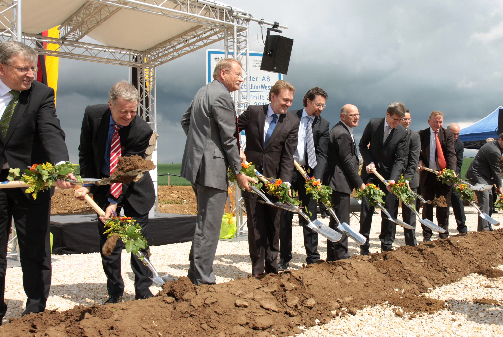 Offizieller erster Spatenstich zur Neubaustrecke Wendlingen-Ulm am 7. Mai 2012. Personen (vlnr): Hermann Strampfer, Martin Schairer, Wolfgang Drexler, Volker Kefer, Andreas Scheuer, Winfried Hermann, Eckhart Fricke, Peter Hauk, Claus Schmiedel, Ivo Gönner (im Hintergrund)